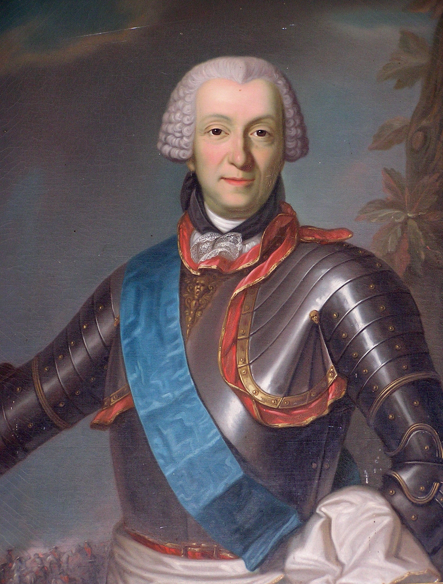 François Louis Antoine, comte de Bourbon Busset (1722-1793), Lieutenant général des armées royales, cousin du roi